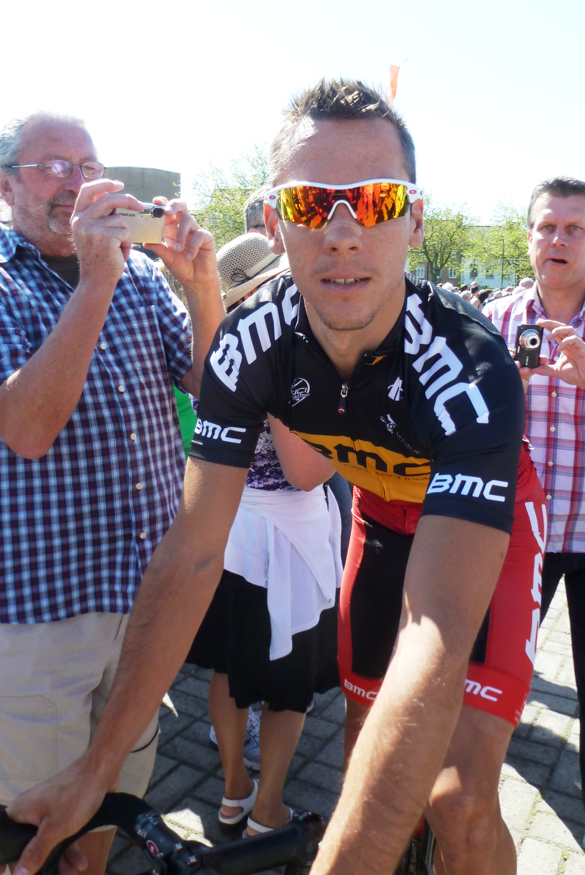 Philippe Gilberg, belgischer Radrennfahrer, Belgien-Rundfahrt 2012 in Heist